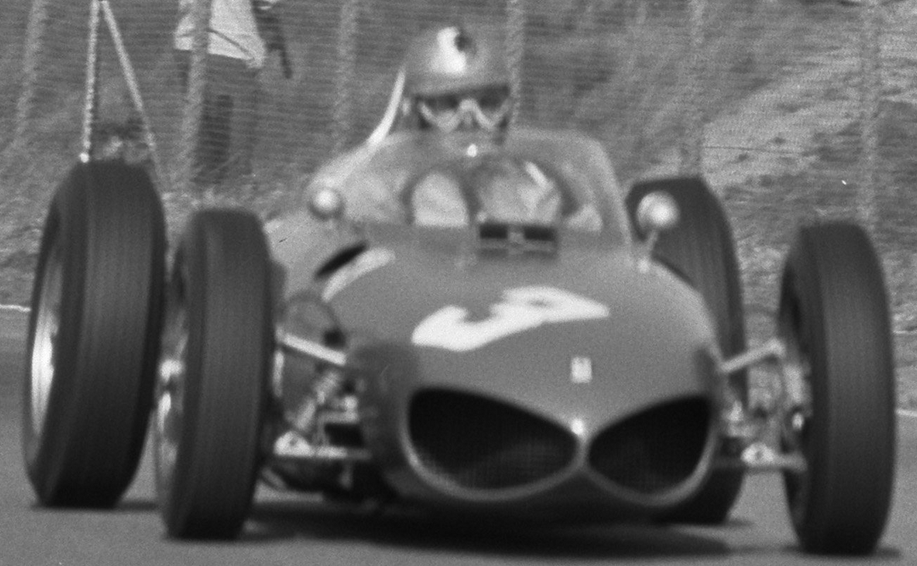 Grand Prix te Zandvoort. Wolfgang Graf Berge von Trips in zijn Ferrari (hij wint de wedstrijd).